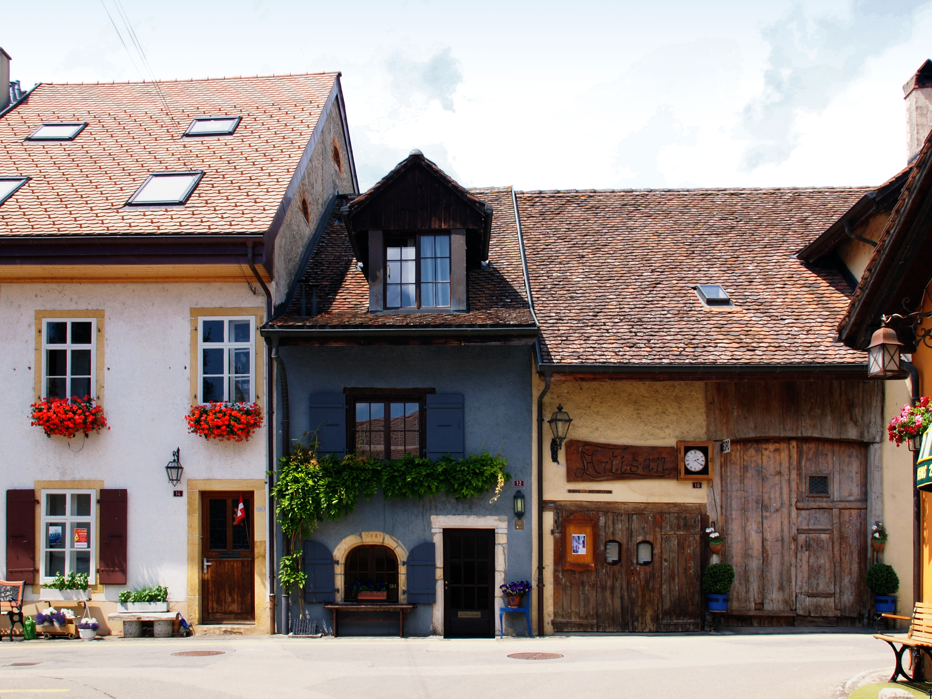 Concise (Suisse) - Le Pontet / Place de l'Église